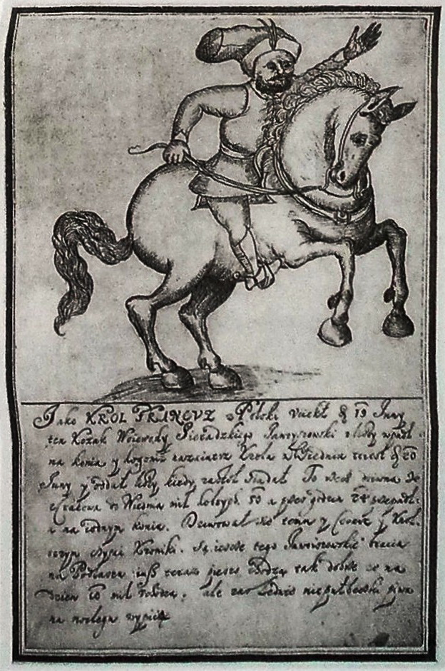 Явойшовский - казак на службе Альбрехта Лаского, фототипия по гравюре 16 в.